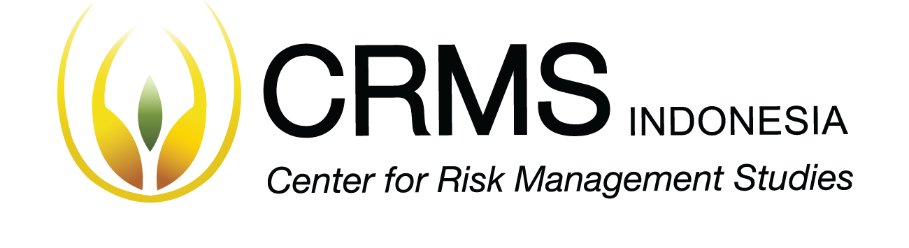 Logo CRMS